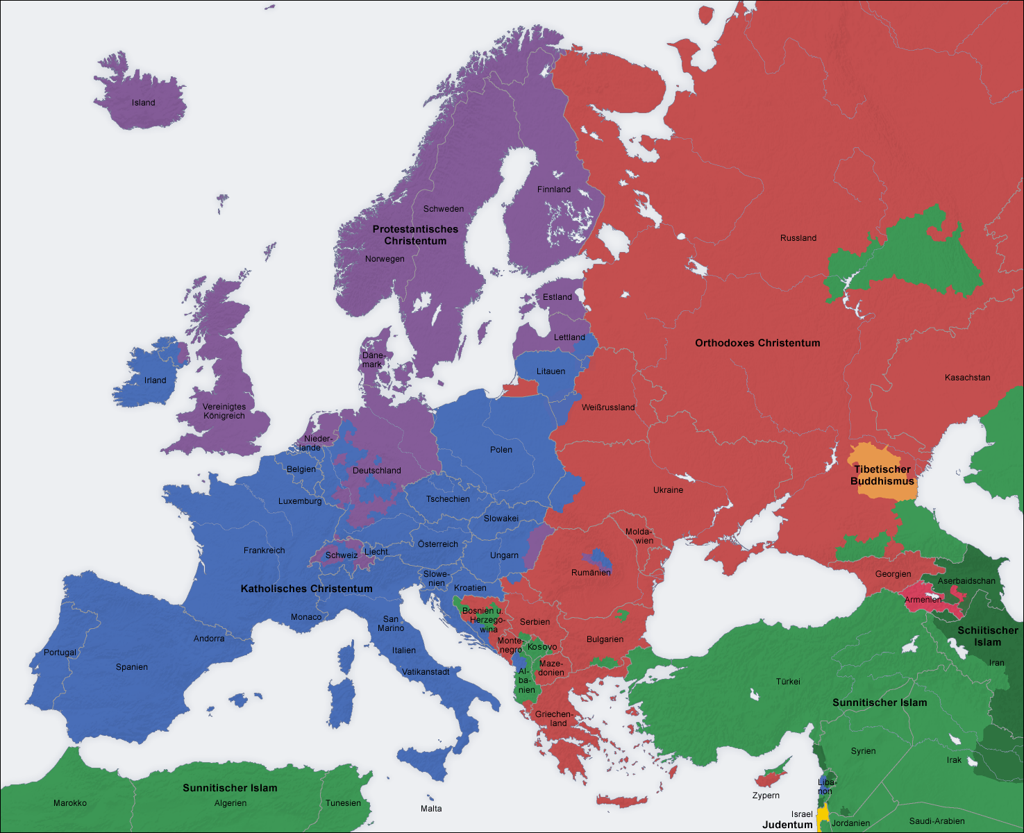 Religionen in Europa, Karte de.Legende: Katholisches Christentum Evangelisches Christentum Orthodoxes Christentum Orientalisch-Orthodoxes Christentum Sunnitischer Islam Schiitischer Islam Tibetischer Buddhismus Judentum